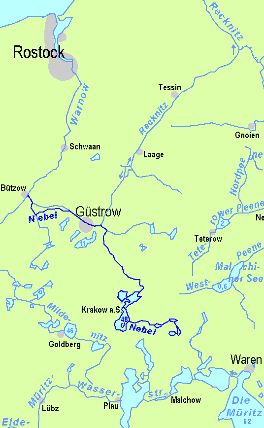 Karte der Nebel und der unteren Warnow in Mecklenburg